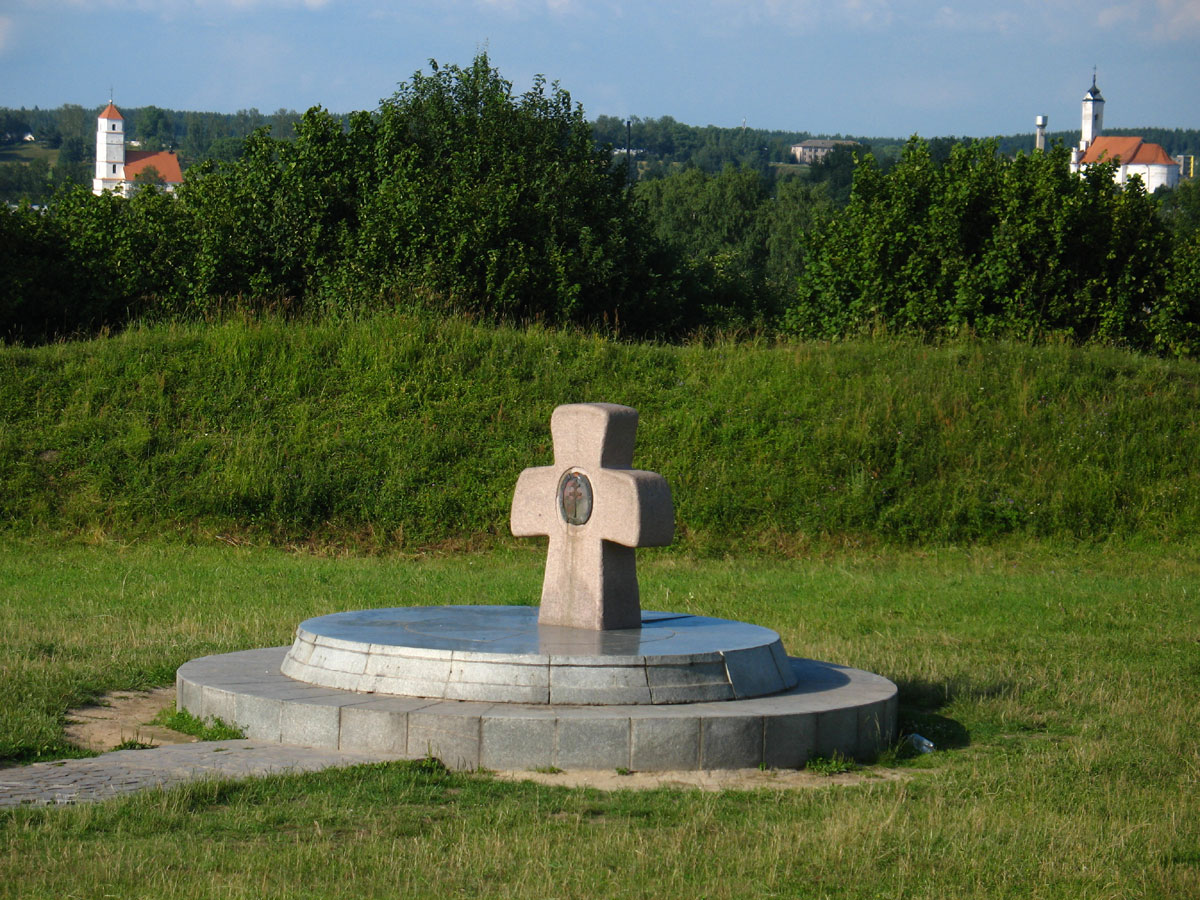 Беларуская (тарашкевіца): Заслаўе з боку гарадзішча Замэчак